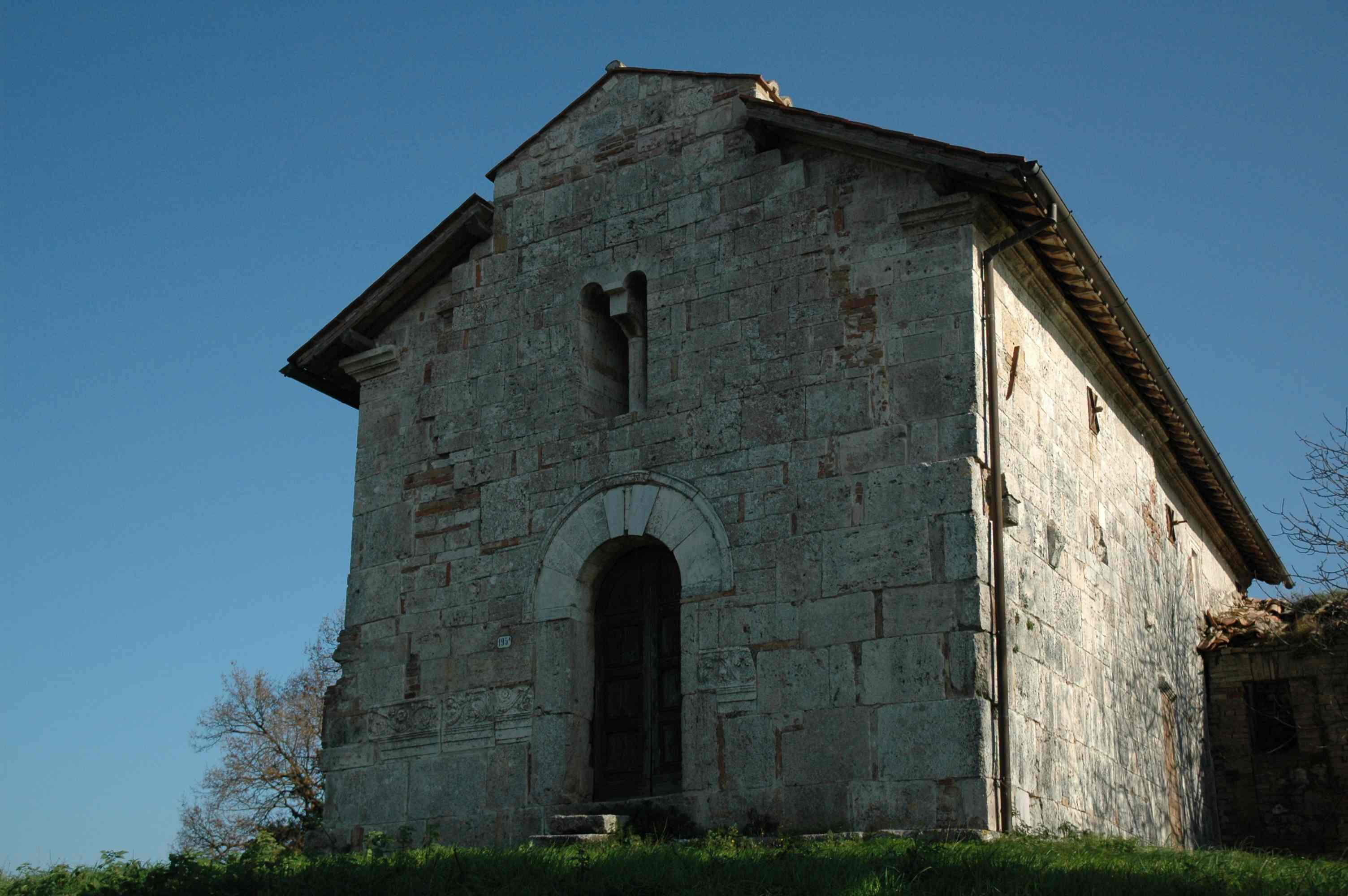 Chiesa di San Lorenzo, in località Farnetta, nel comune di Montecastrilli (provincia di Terni). Fonte Opera propria Data 02/04/08 Autore Me medesimo